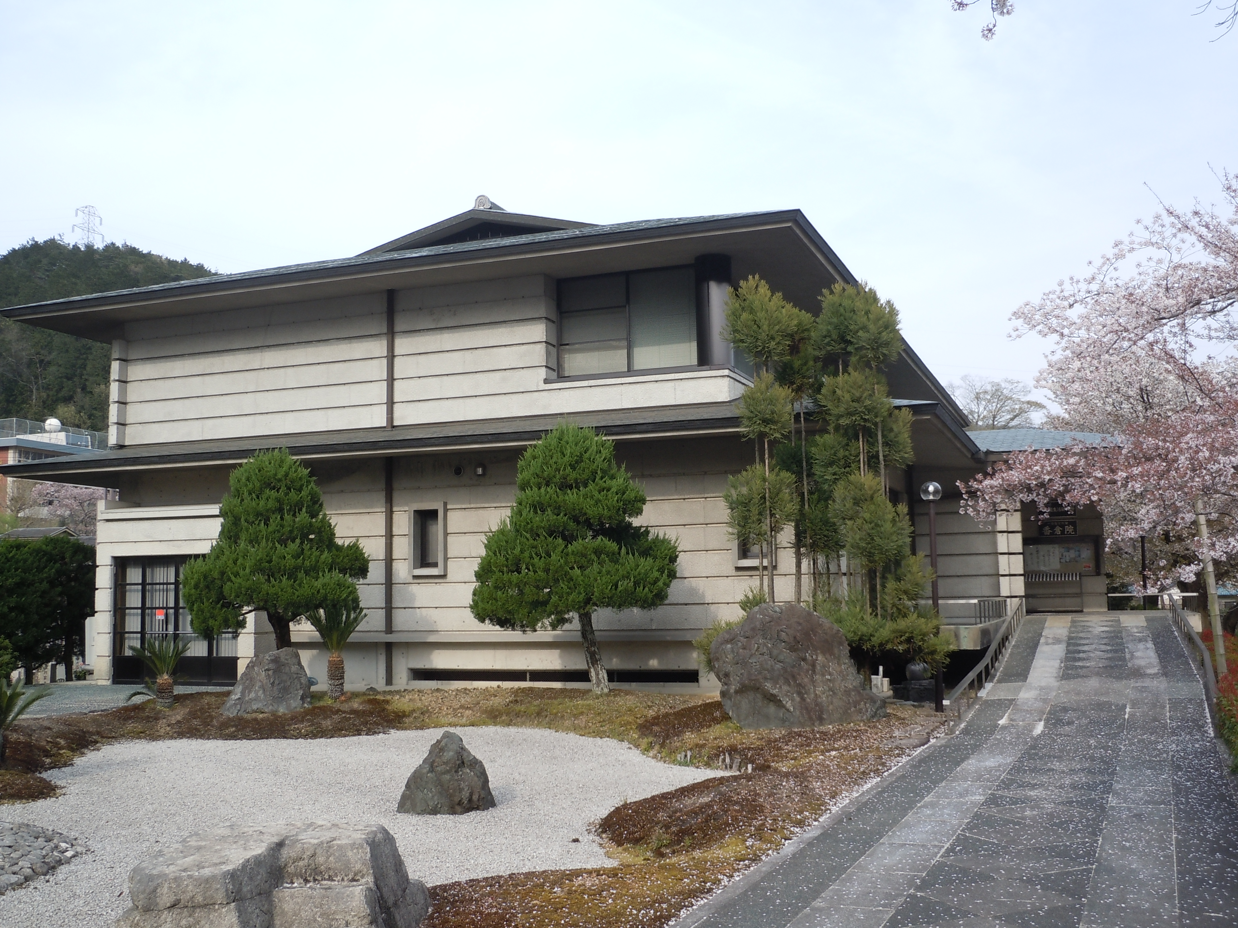 西田天香の資料館「香倉院」。山科区にて。